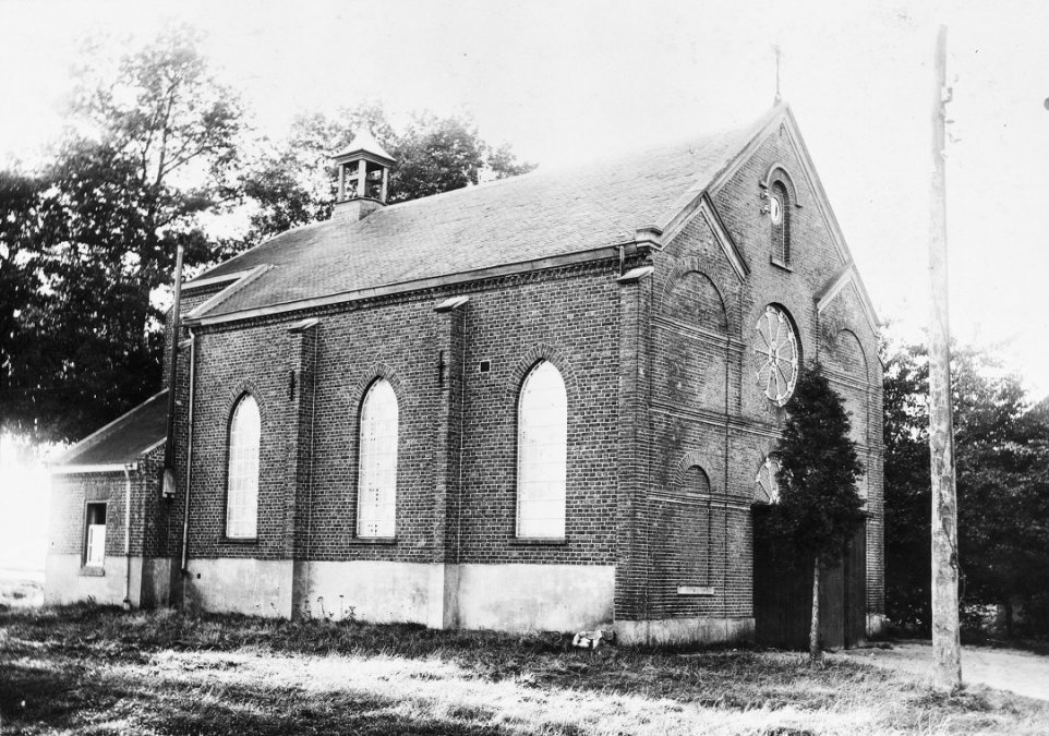 Oude Kerk: exterieur 1866 Sint Gertrudiskerk